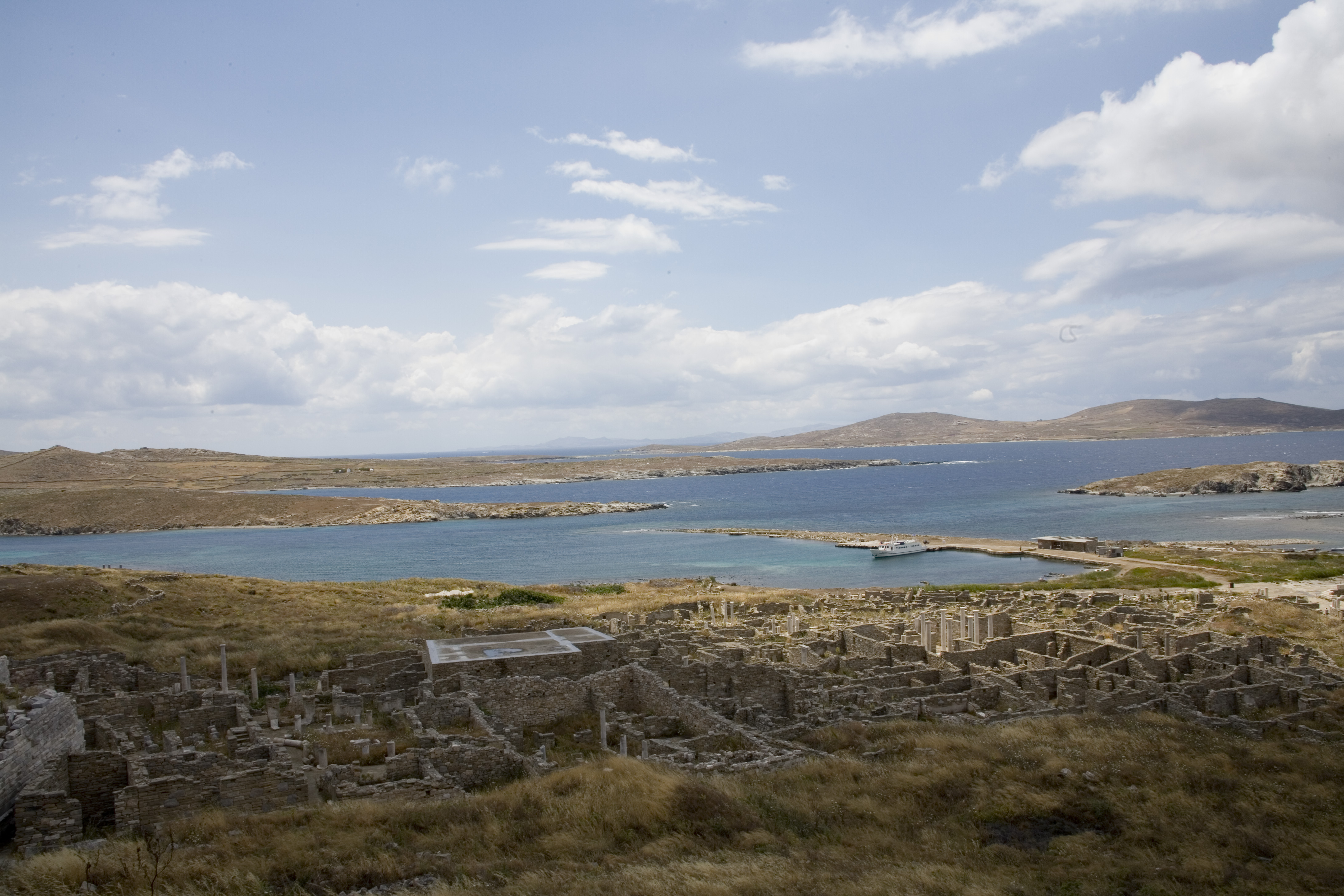 Ruinas de Delos, islas Cícladas (Grecia)